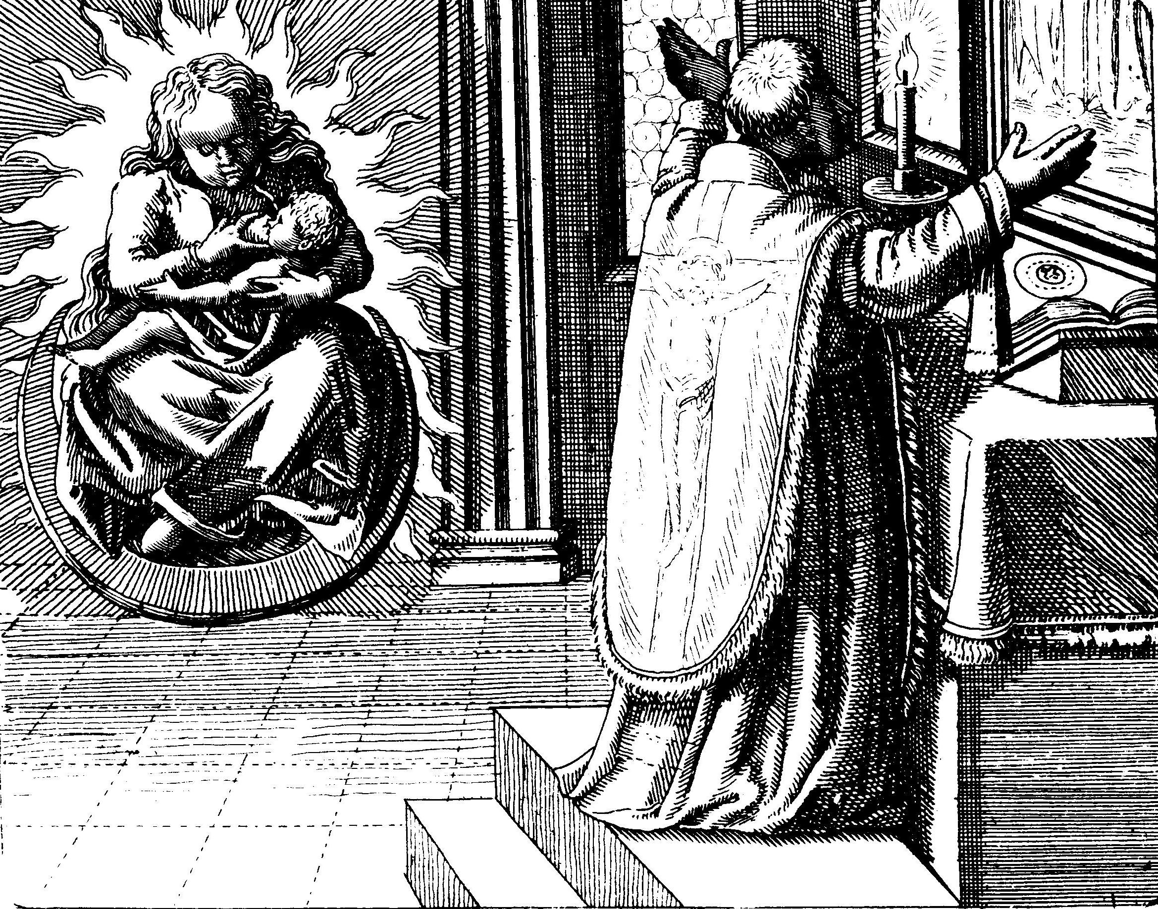 Der ungarische Alchemist Melchior Cibinensis auf einem Kupferstich aus dem Buch "Symbola Aureae Mensae duodecim nationum" (1617) von Michael Maier.